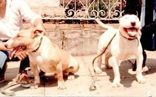 Bull Terriers iniciais, utilizados no desenvolvimento da raça Dogue brasileiro